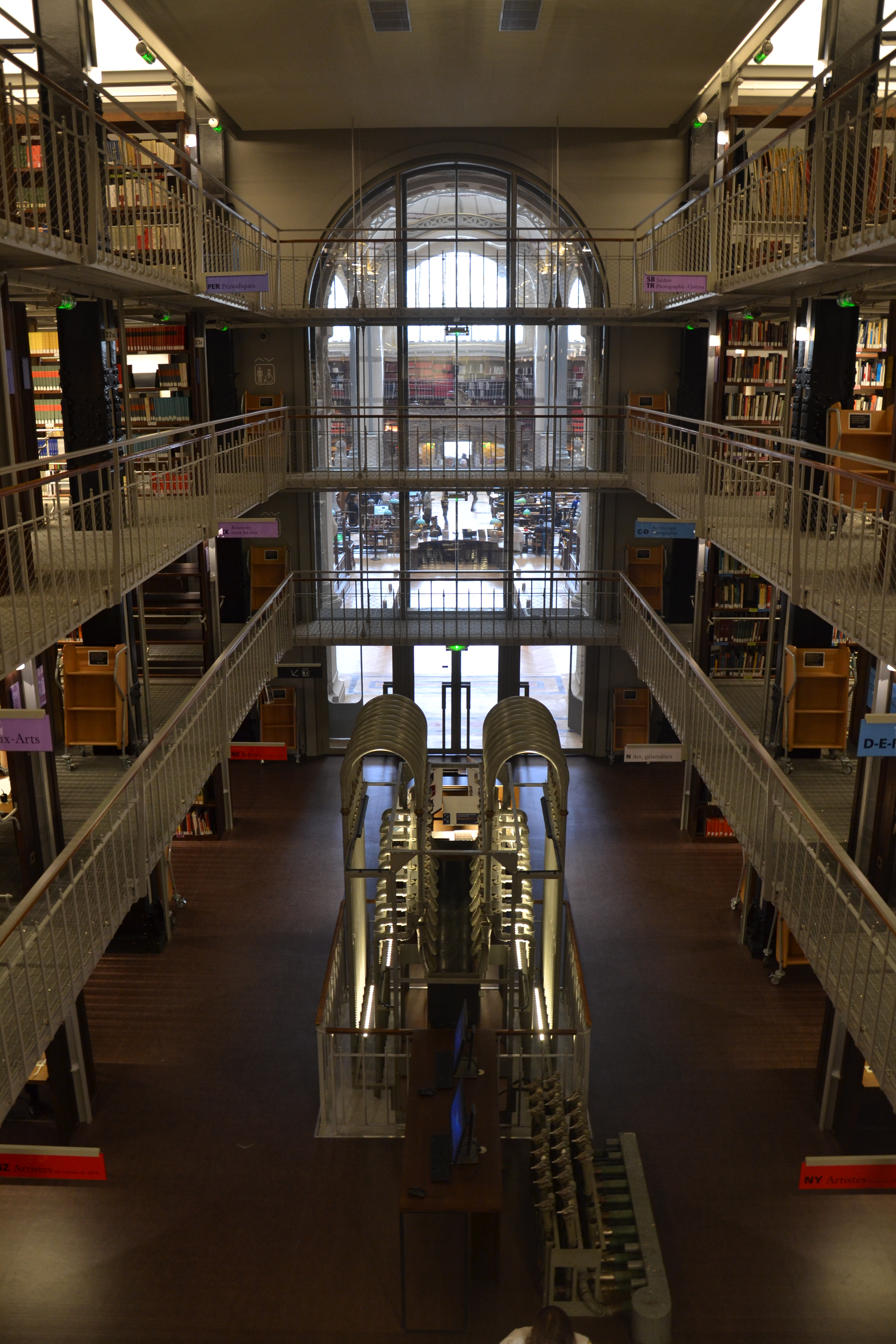 Magasin central de la Bibliothèque nationale de France, conçu par Labroute, site Richelieu.